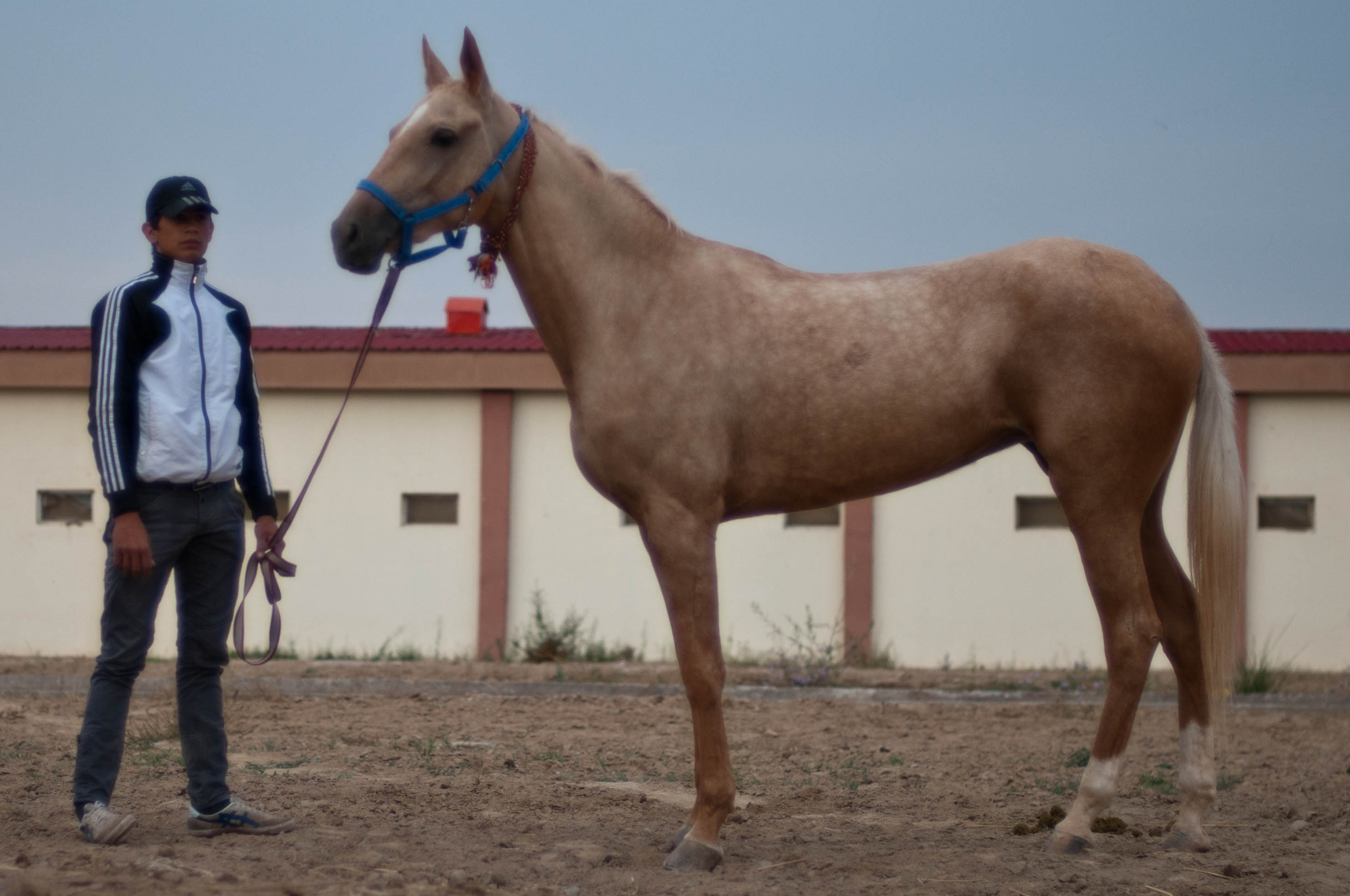 Studfarm in Turkmenistan